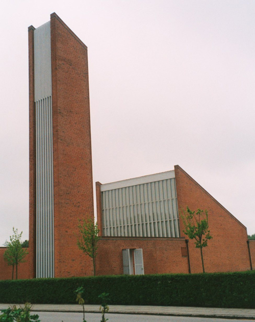 Stoholm Kirke - set fra Søndergade